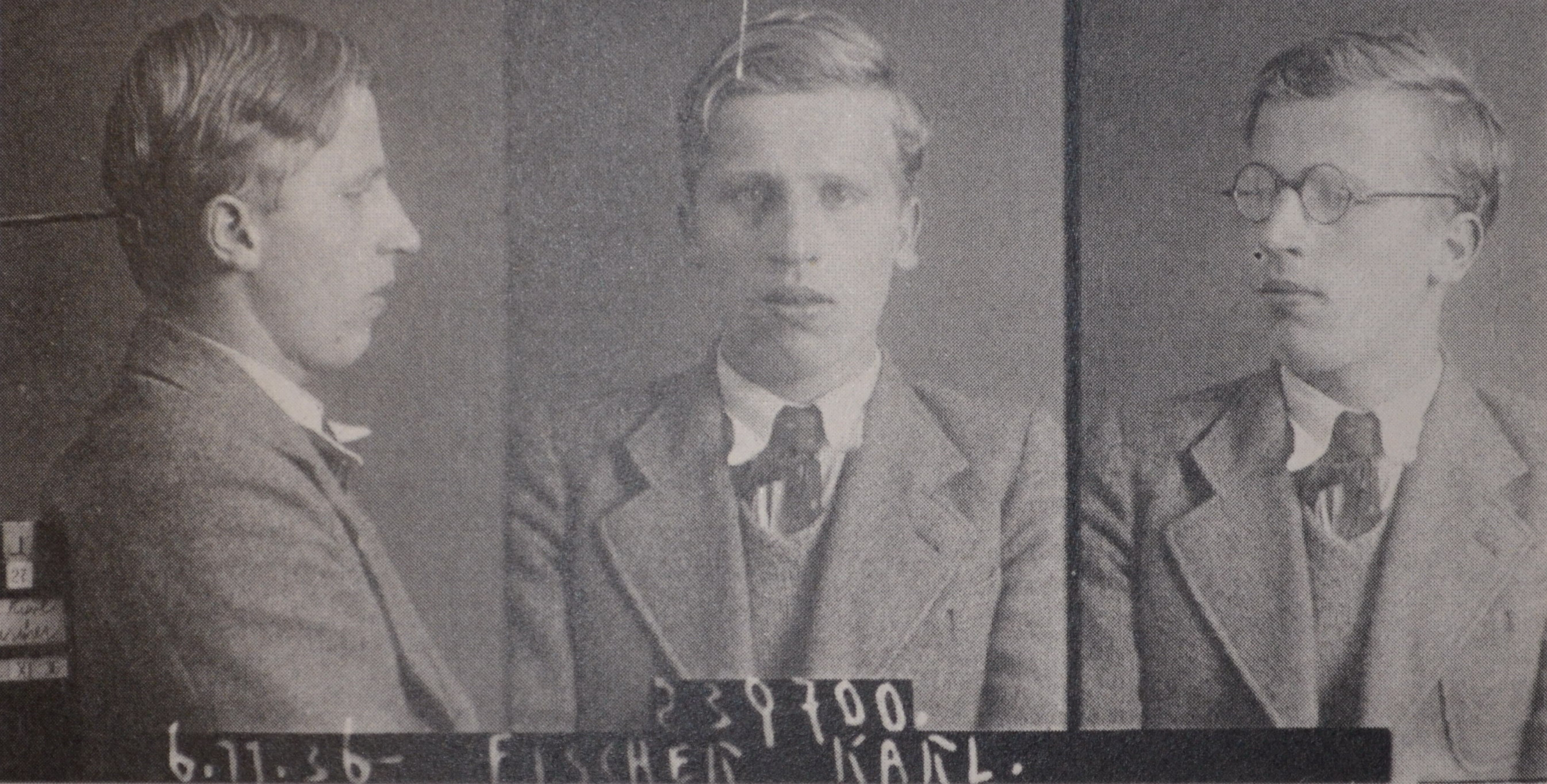 Karl Fischer, Foto der Österreichischen Staatspolizei, 6.11.1936, in Privatbesitz von Dnalor_01, Sohn Karl Fischers. Auch in: Dokumentationsarchiv des österreichischen Widerstandes, Altes Rathaus, Wipplingerstr.6-8 A-1010 Wien. Das Bild wurde auch verwendet und veröffentlicht im Buch: Bernhard Kuschey: Ernst und Hilde Federn. Die Ausnahme des Überlebens. Ernst und Hilde Federn. Eine biographische Studie und eine Analyse der Binnenstrukturen des Konzentrationslagers. Psychosozial-Verlag, Gießen 2003, ISBN 3-89806-173-6, auf der Seite 239. Die Österreichische Staatspolizei (StaPo): Der österreichische Staatspolizeiliche Dienst (StaPo) war als Vorläufer des Bundesamts für Verfassungsschutz und Terrorismusbekämpfung bis 2002 der Inlandsgeheimdienst des Bundesinnenministeriums. In der breiten Öffentlichkeit ist der Name „Stapo“ noch immer verbreitet.